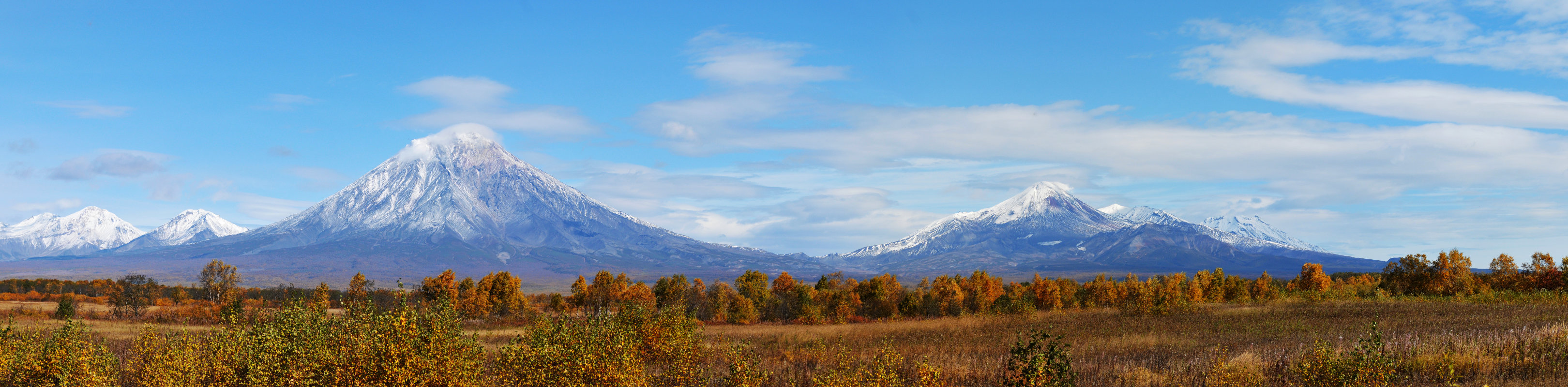 Домашние вулканы. По дороге в Елизово.